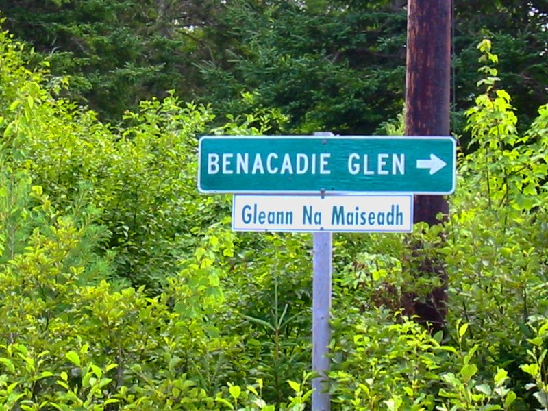 Bilingual sign, Cape Breton, Nova Scotia, in Scottish GaelicBenacadie Glen